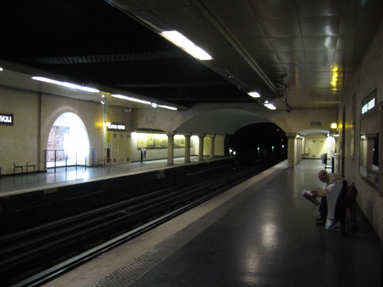 Louvre-Rivoli - Crypte Paris line 1 station extension.